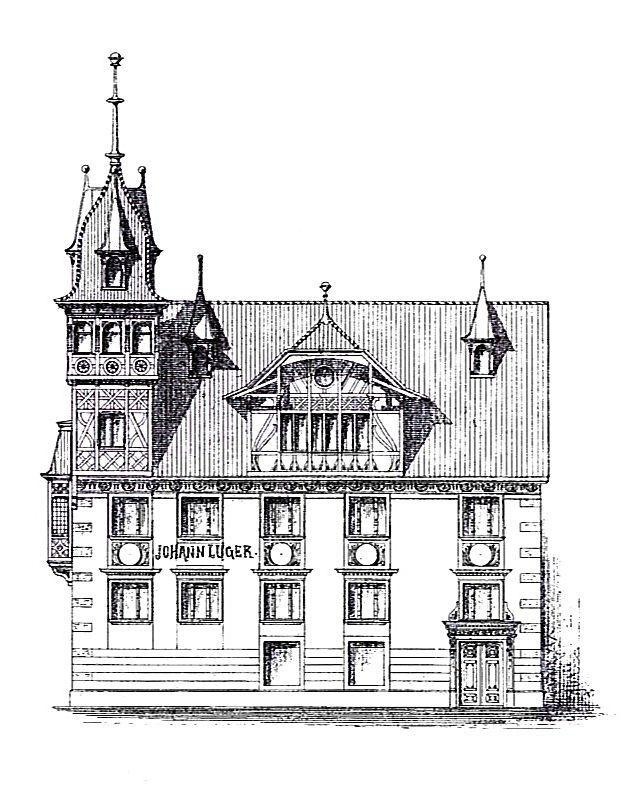 Johann-Luger-Haus, Umbau (1900) Marktplatz Dornbirn, Fassade von Architekt Hanns Kornberger, ehemals Gasthof Sonne - heute Cafe Steinhauser